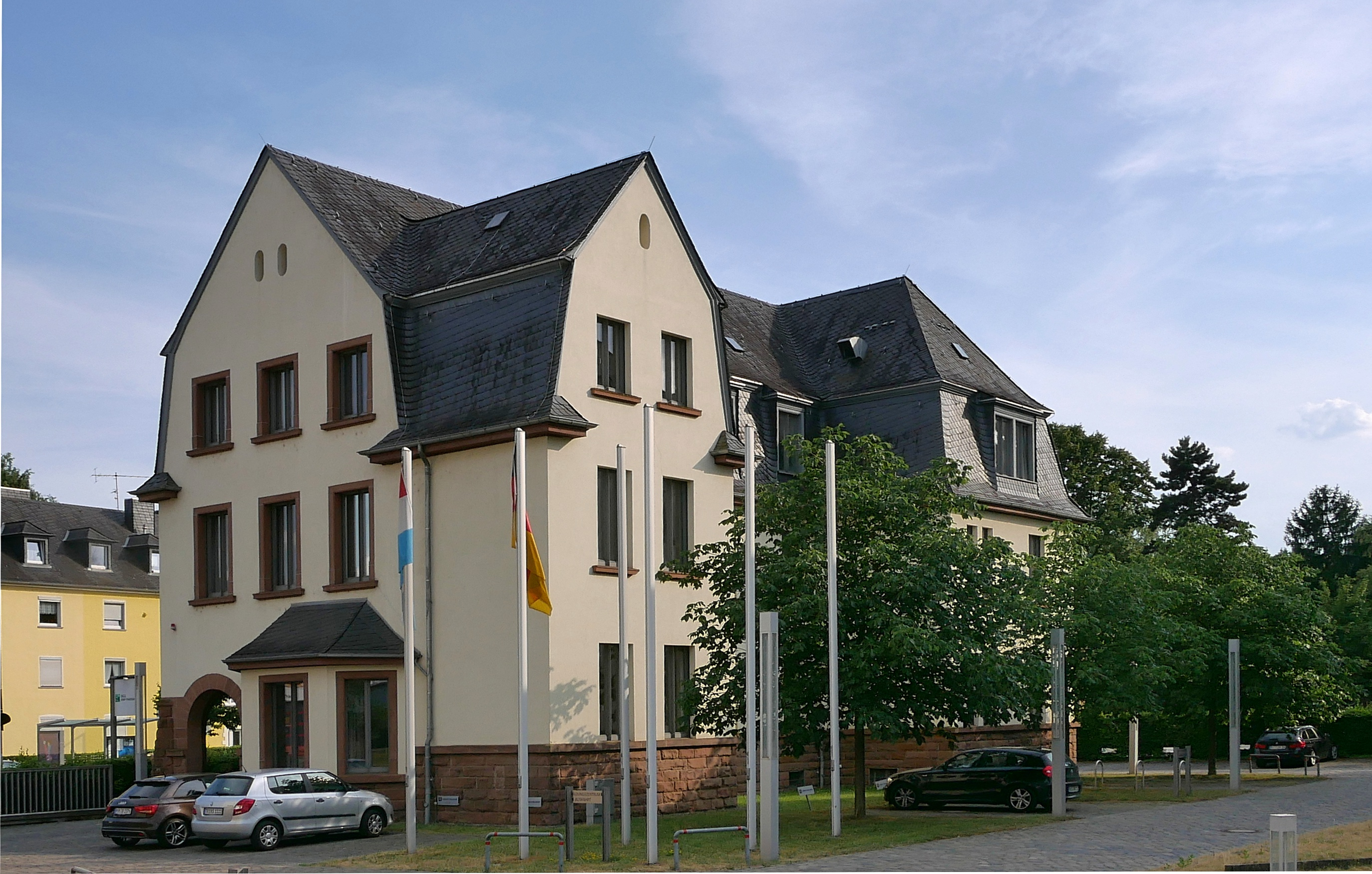 Trier :ehemalige Jaegerkaserne HerzogenbuscherStrasse 10 jetzt Bürogebäude einer Bank